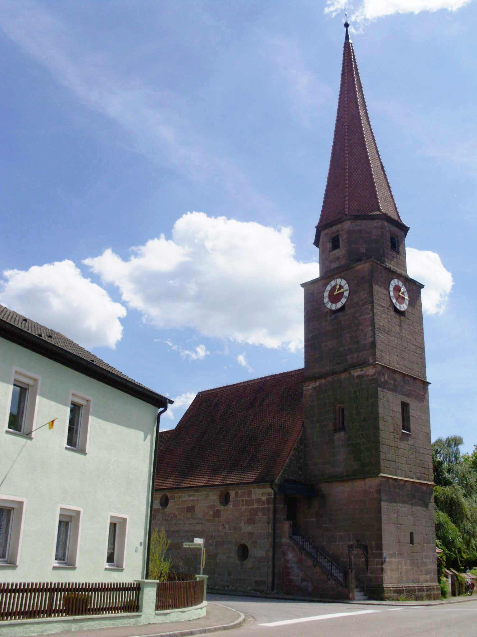 Haundorf, Gemeinde im mittelfränkischen Landkreis Weißenburg-Gunzenhausen (Bayern), Evang.-Luth. Pfarrkirche St. Wolfgang